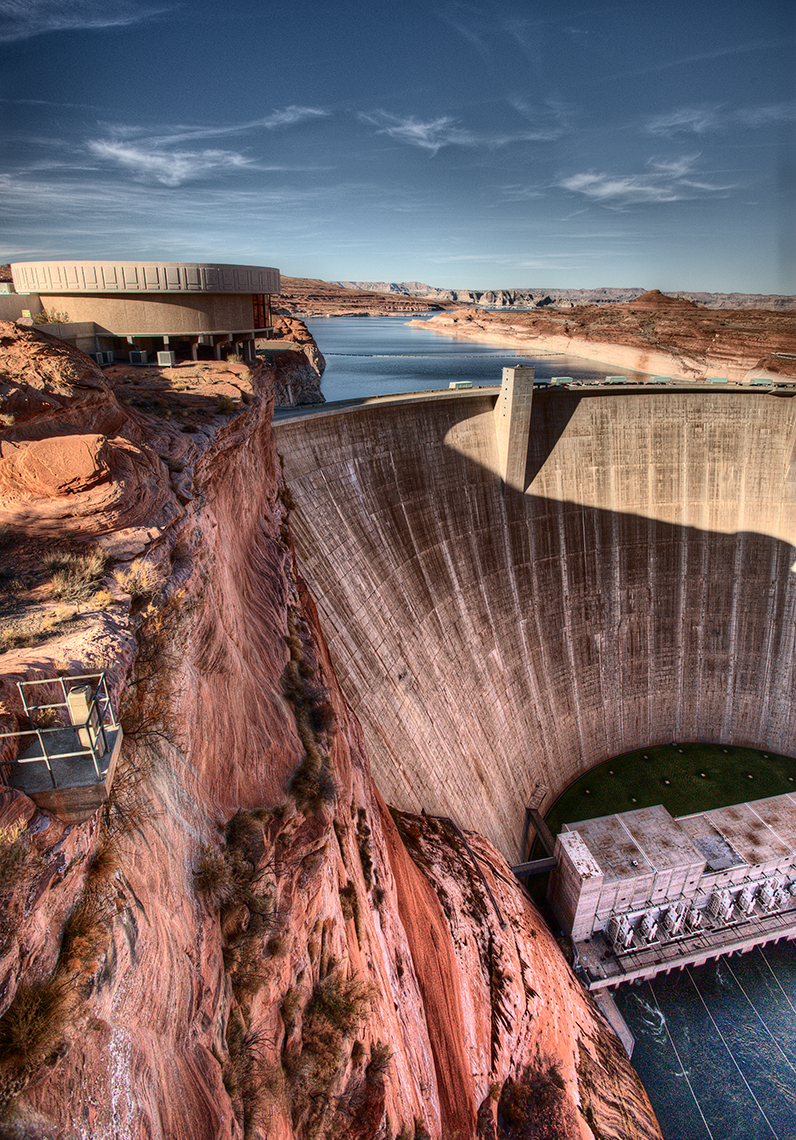 Glen Canyon Dam